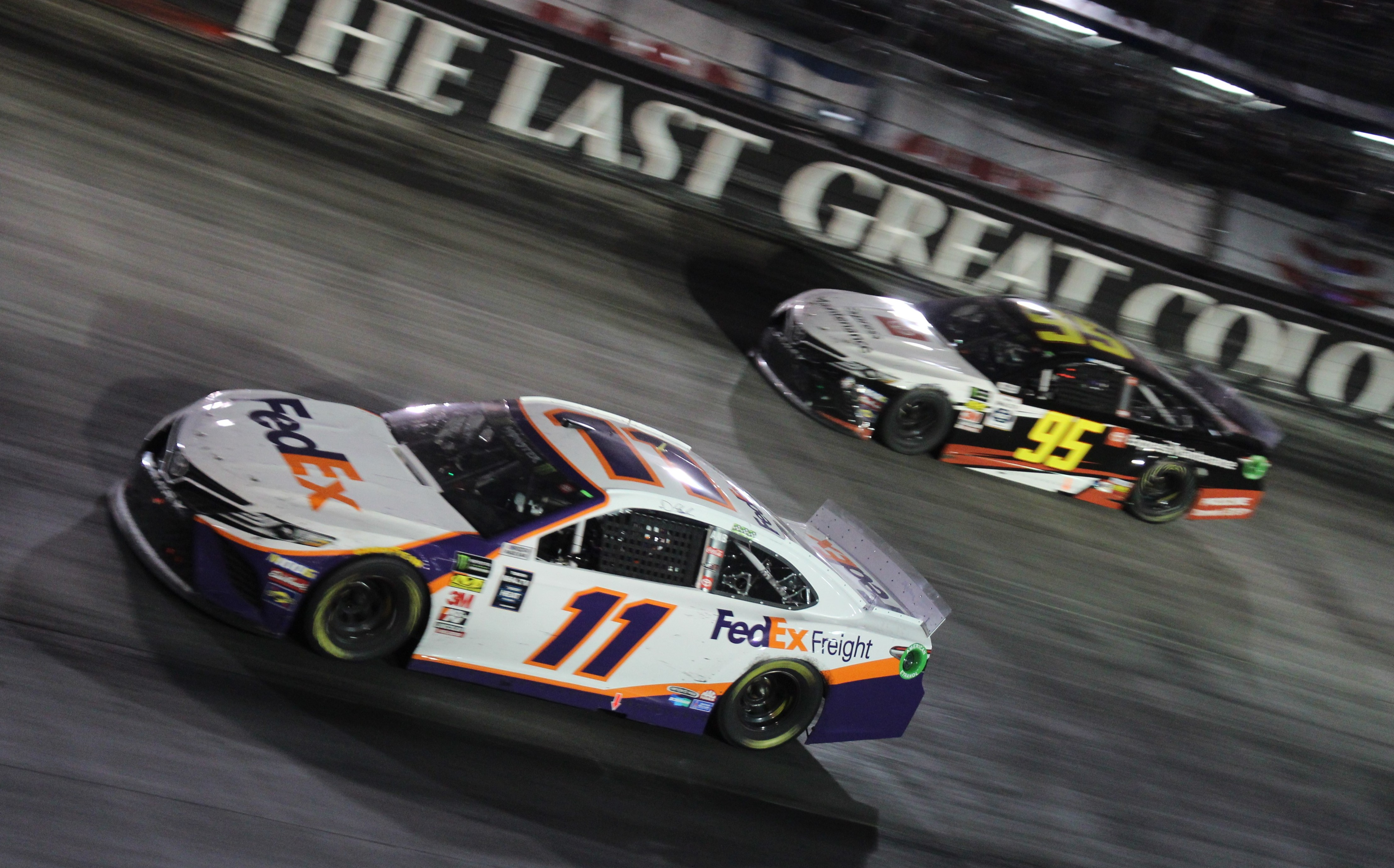 denny hamlin